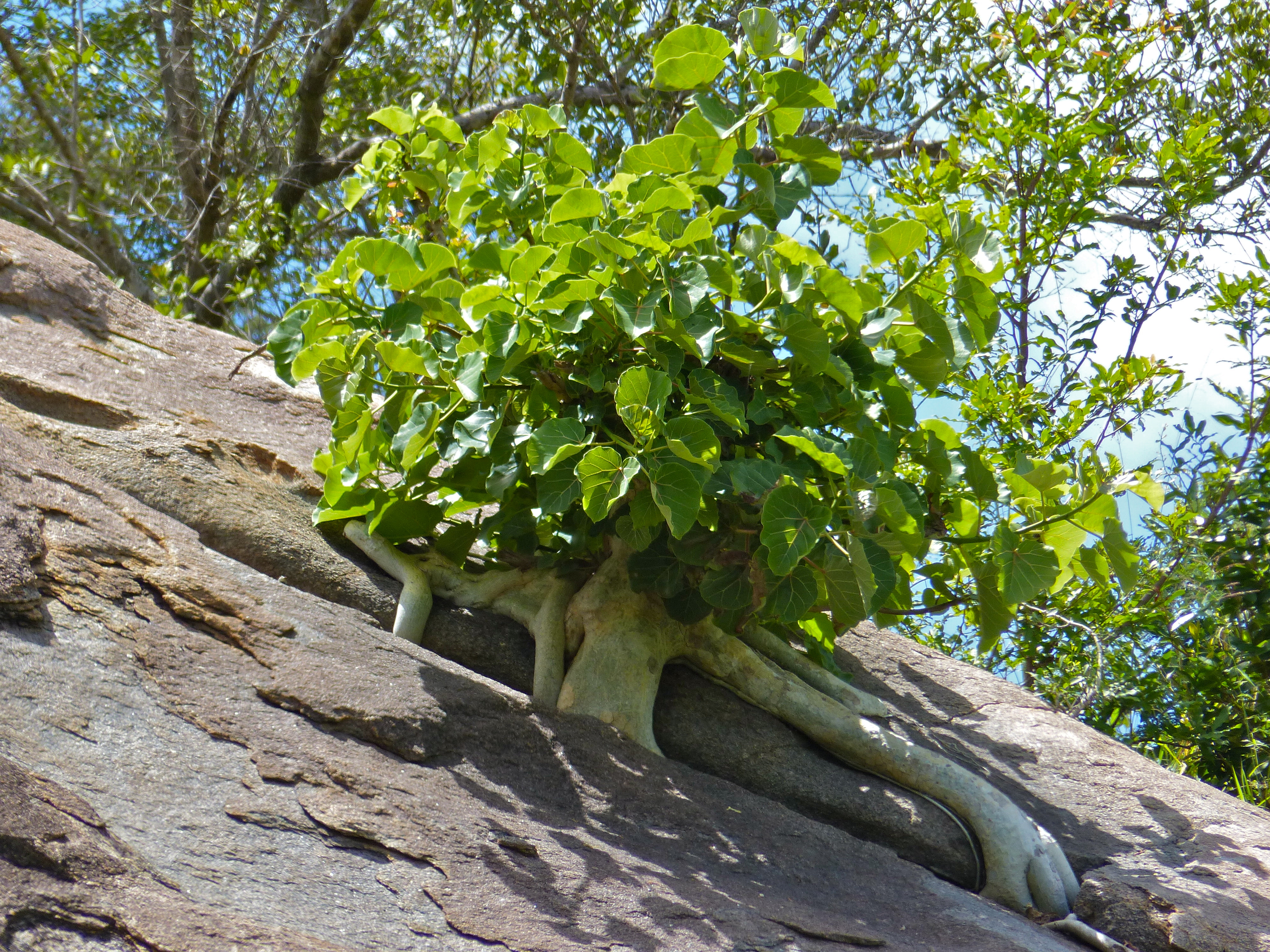 H1-2 Road East of Skukuza, Kruger NP, SOUTH AFRICA